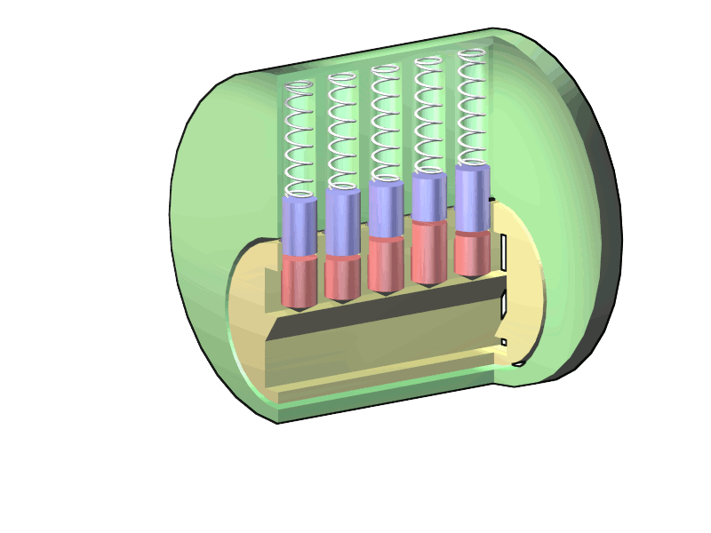 Van Engelse Wikipedia. Afbeelding gemaakt door nl::en:User:Wapcaplet.